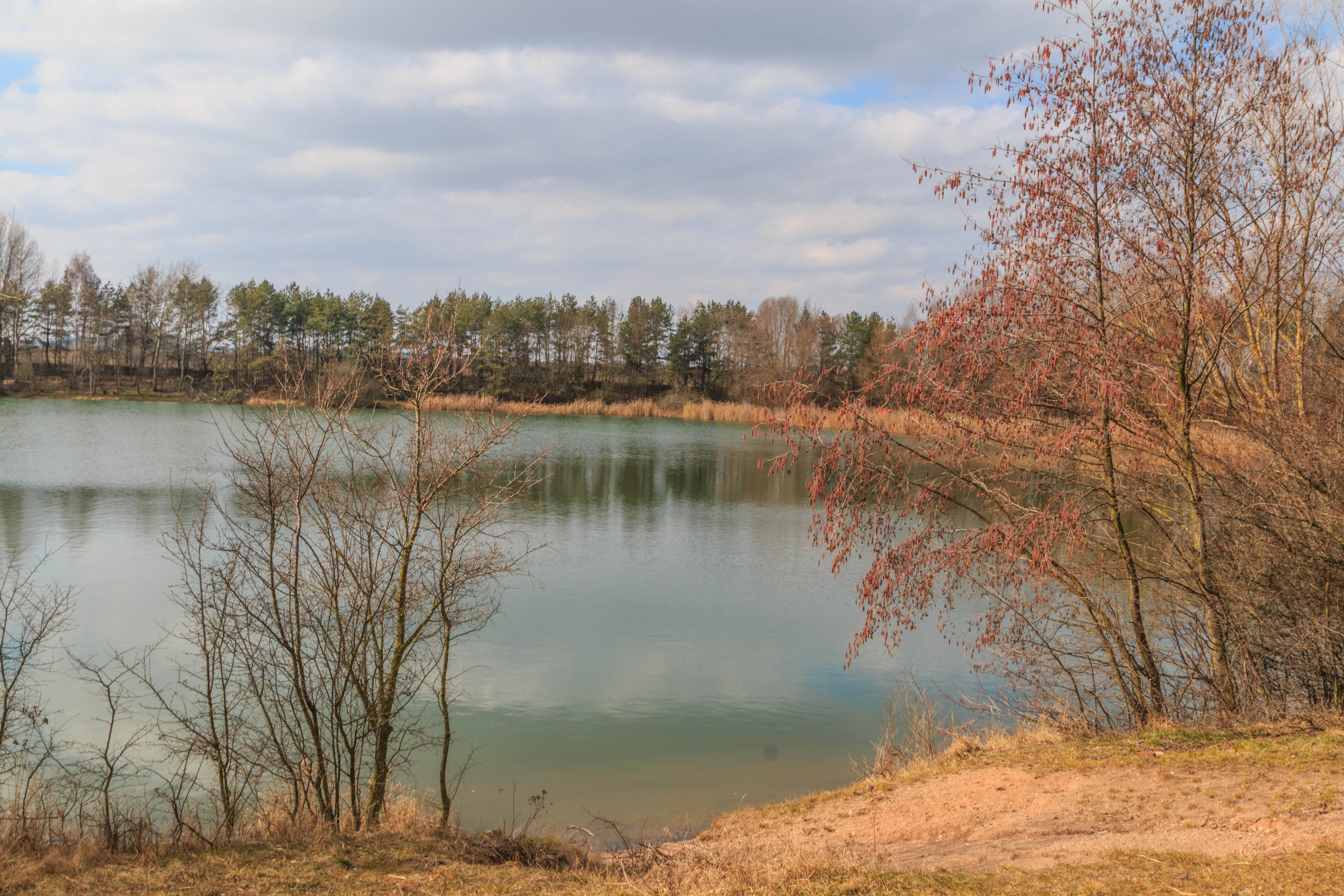 Plačický písník Project: Vodstvo